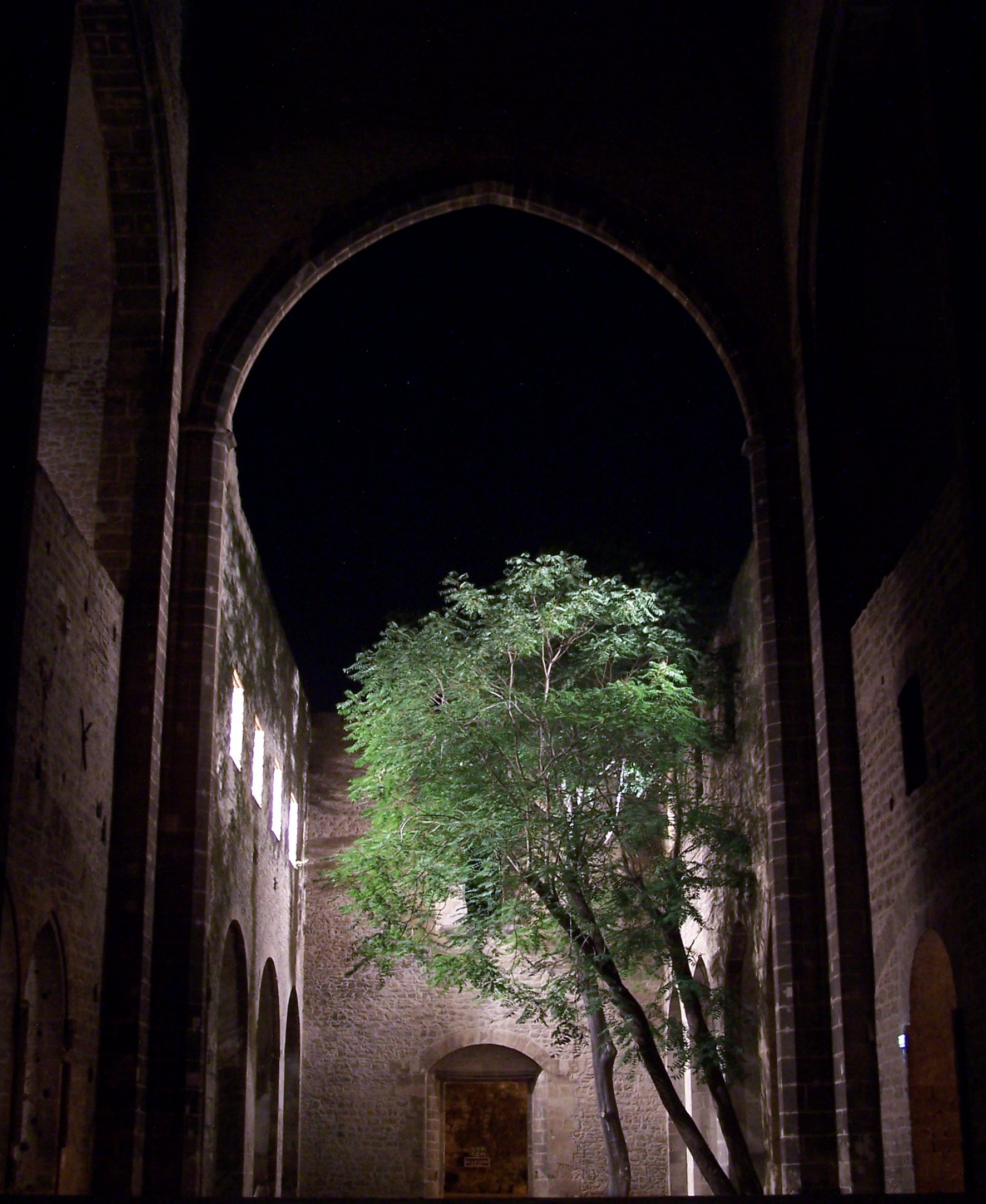 Santa Maria dello Spasimo